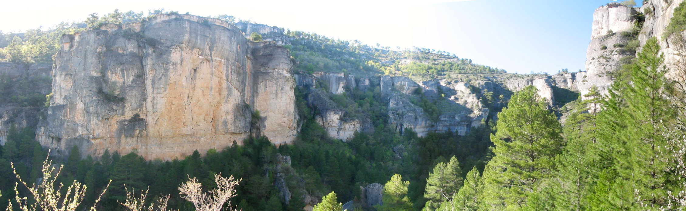 Hoz de Beteta, Parque Natural Serranía de Cuenca, España. Afloramientos de calizas del Cretácico.